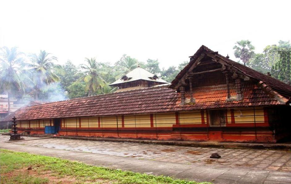 കിള്ളിക്കുറിശ്ശിമംഗലം നാലമ്പലം